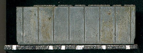 Bleisatz: Lettern für die Zeilen einer Zeitungsspalte, Seitenansicht (o.) und Draufsicht (u.), Danziger Neueste Nachrichten, 1. Hälfte 20. Jh.